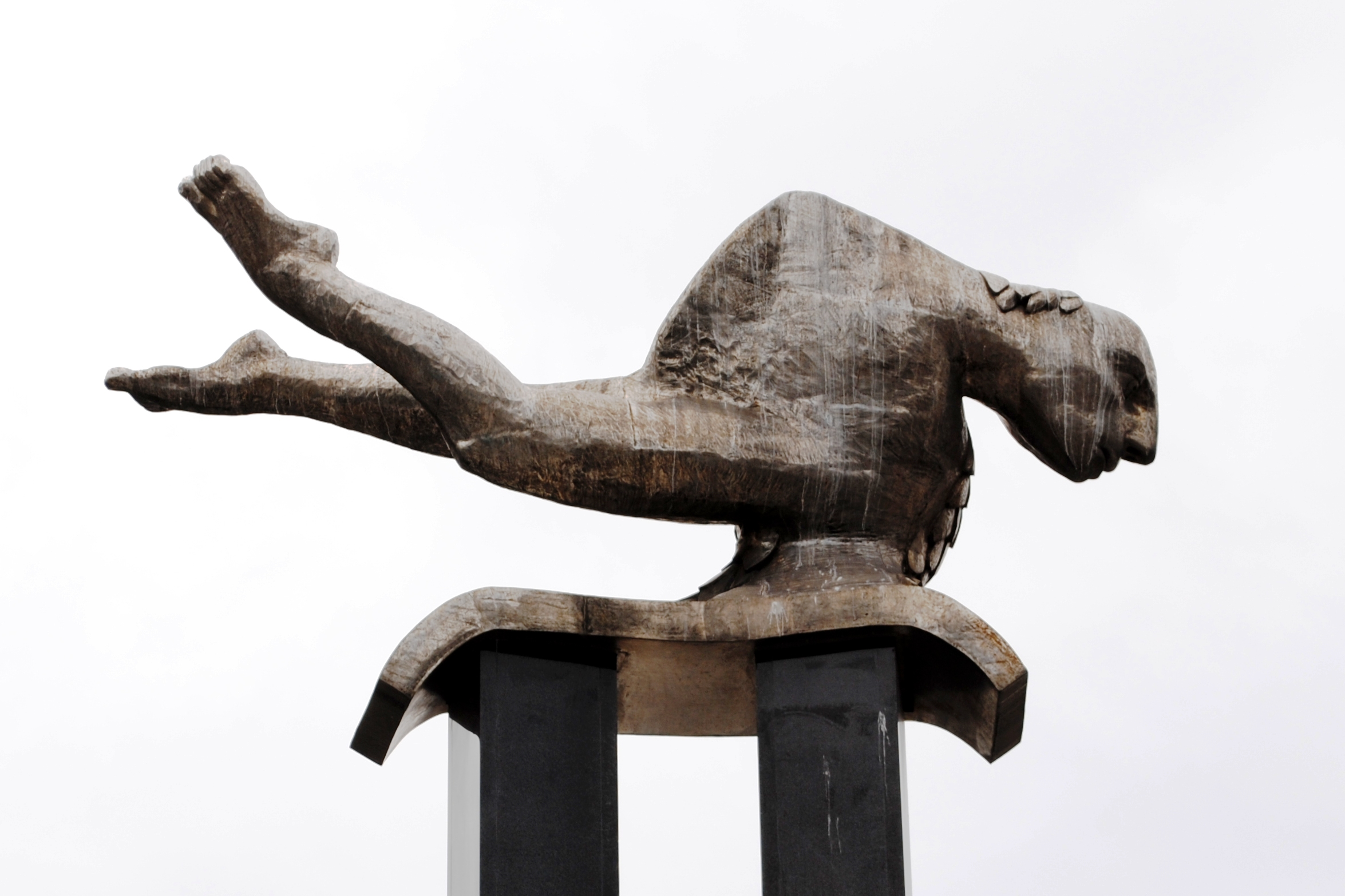 O sereo (1991), na Porta do Sol de Vigo, en aceiro inoxidable enriba de dúas columnas de 13 metros de granito negro, obra de Francisco Leiro Lois.